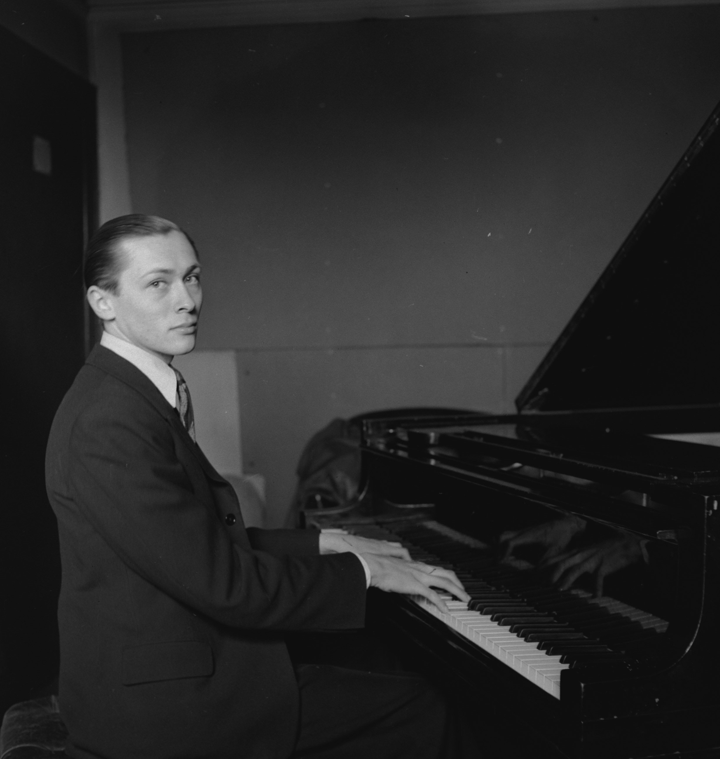 Collectie / Archief : Fotocollectie Anefo Reportage / Serie : HIE [Holland in England] / Anefo Londen serie Beschrijving : Componist Gerry Schuurman aan de vleugel Datum : 9 februari 1945 Locatie : Groot-Brittannië Trefwoorden : componisten, pianos, portretten, tweede wereldoorlog Persoonsnaam : Schuurman, Gerry Fotograaf : Onbekend / Publiek Domein, [onbekend] Auteursrechthebbende : Nationaal Archief Materiaalsoort : Negatief (zwart/wit) Nummer archiefinventaris : bekijk toegang 2.24.01.03 Bestanddeelnummer : 935-2296